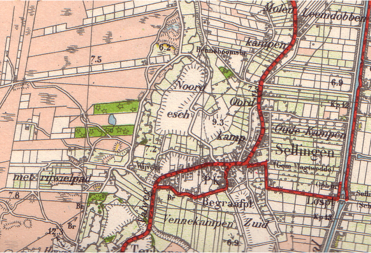 Sellingen op Topografische kaart uit 1933. Publiek domein wegens ouderdom.